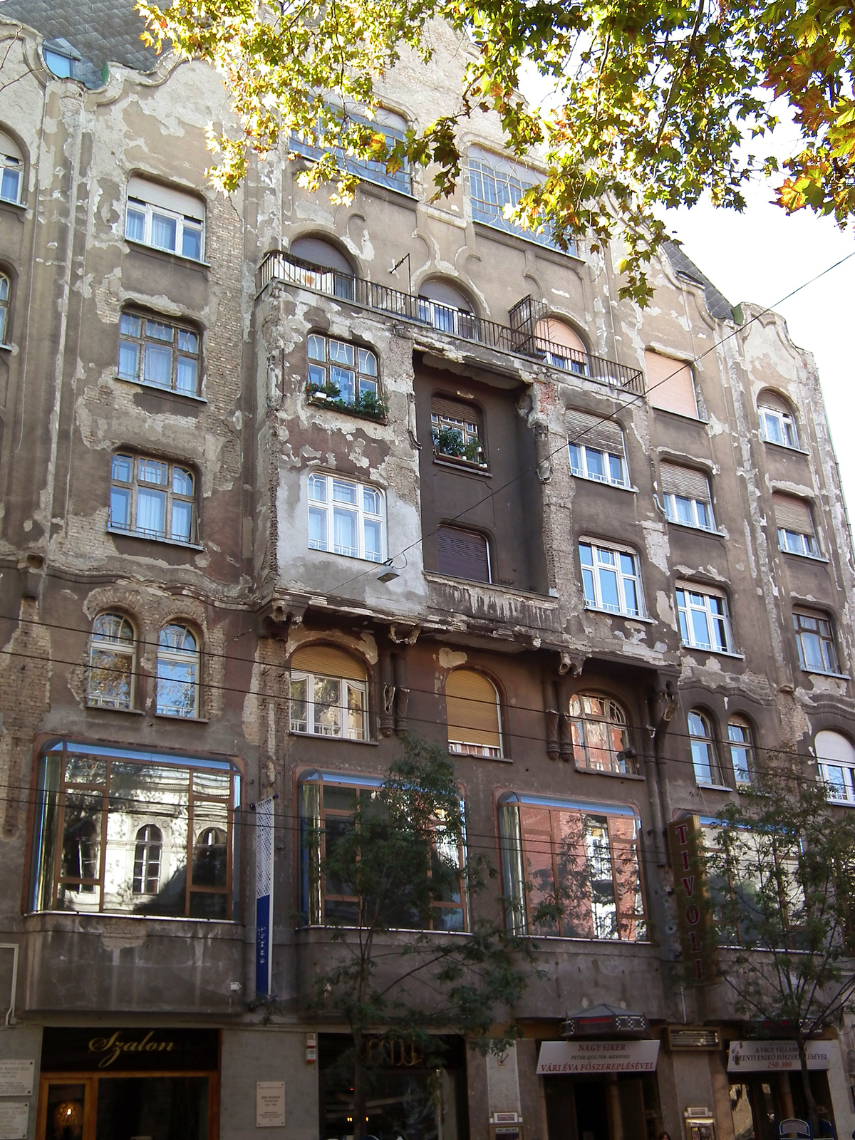 lakóház, Ernst Múzeum és filmszínház (Budapest 6, Nagymező utca 8.) This is a photo of a monument in Hungary, Identifier: 758